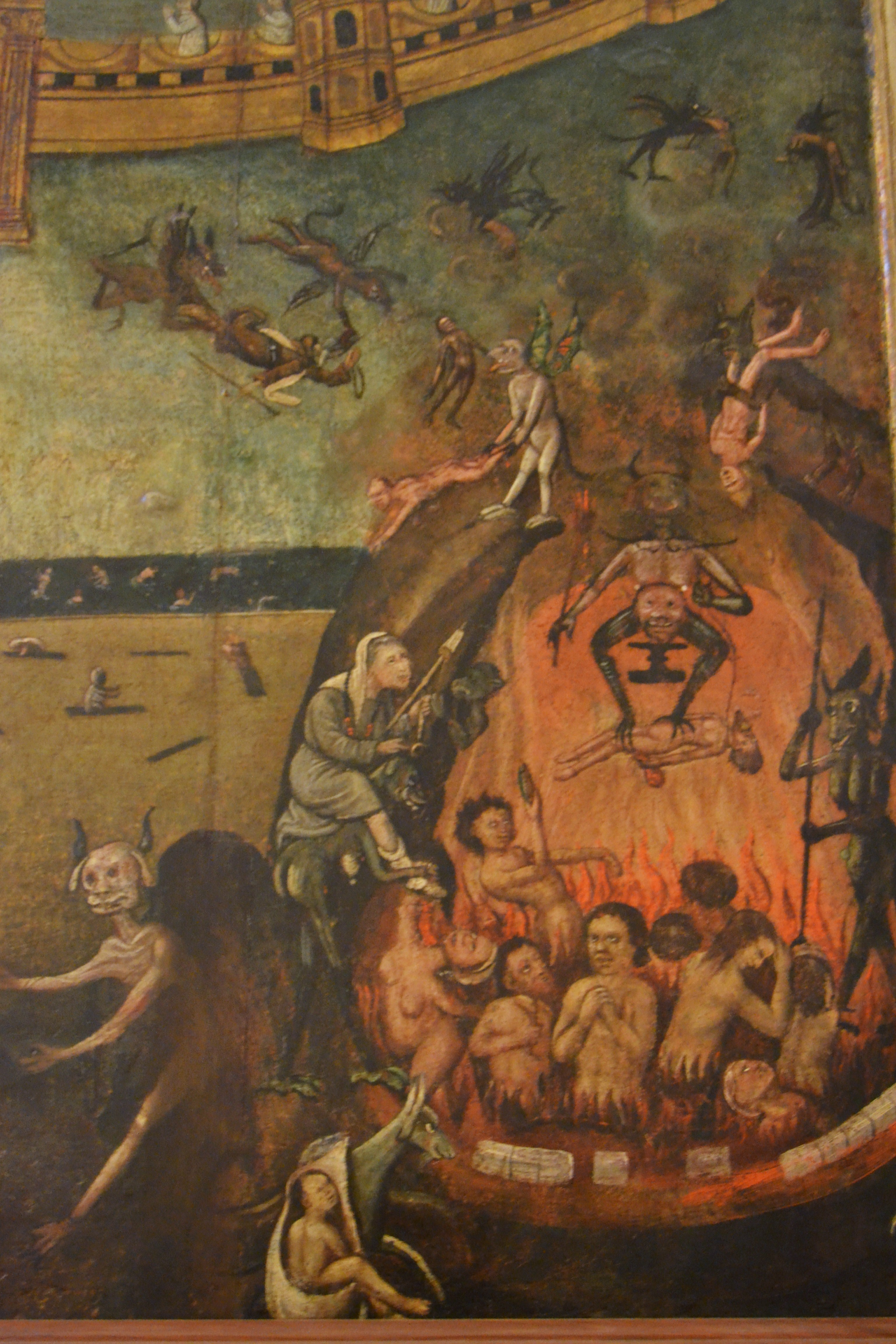 Detall del retaule del Judici Final, església de santa Anna, Borbotó.